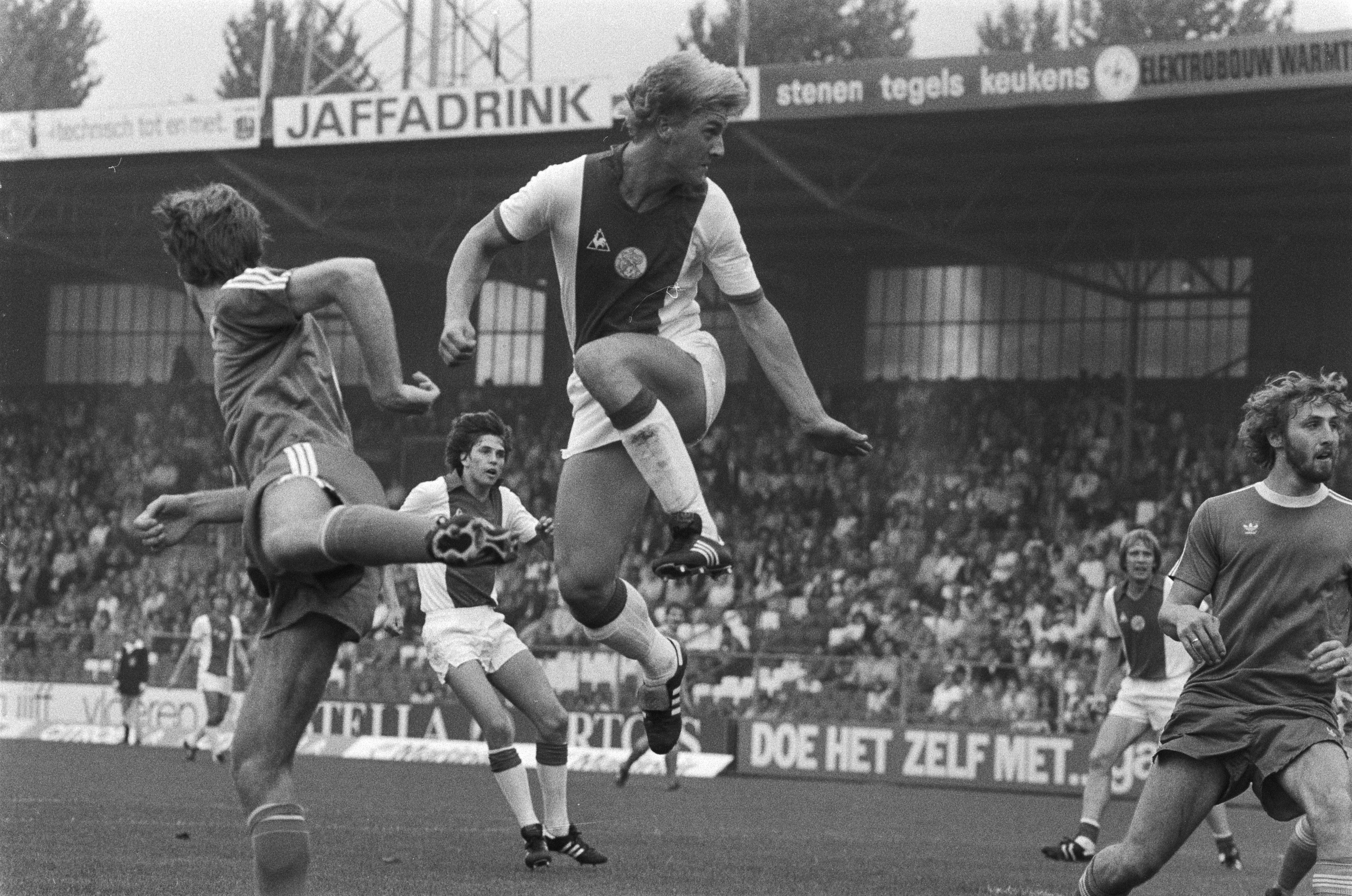 Match de football Ajax - FC Groningue (5-1), Wim Kieft (au centre) en action. Photographie par Marcel Antonisse / Anefo.